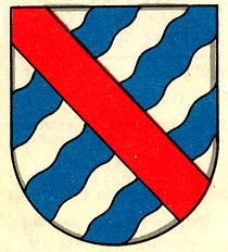 Wappen von Wallenried Kanton Freiburg Schweiz